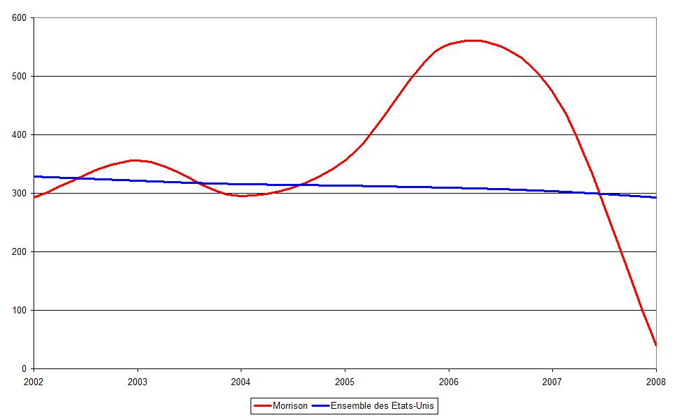 Indices de criminalité à Morrison (Colorado) et dans l'ensemble des Etats-Unis, de 2002 à 2008.